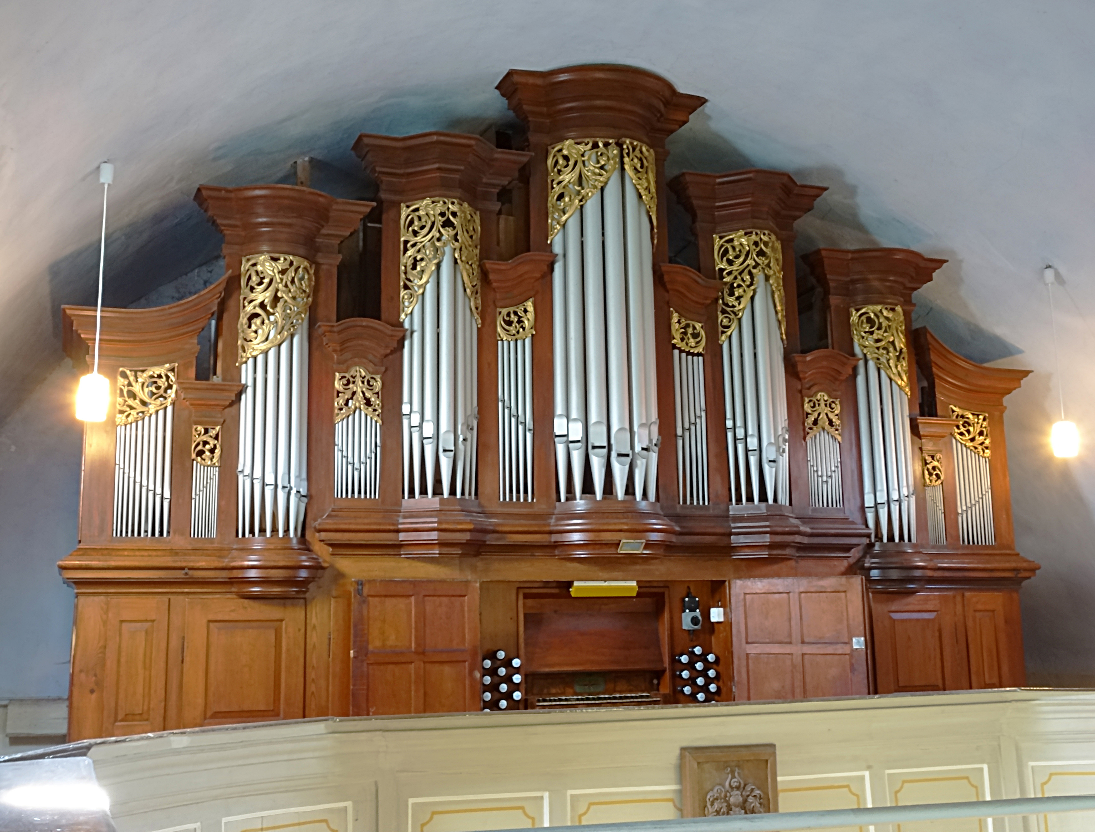 Orgel in der Dorfkirche St. Elisabeth Rockhausen von Johann Michael Hesse II. und seinem Sohn Ludwig Julius Hesse (1858, II/P17)[1], Reparatur 1891 durch Orgelbauer Hülle aus Halberstadt [2]